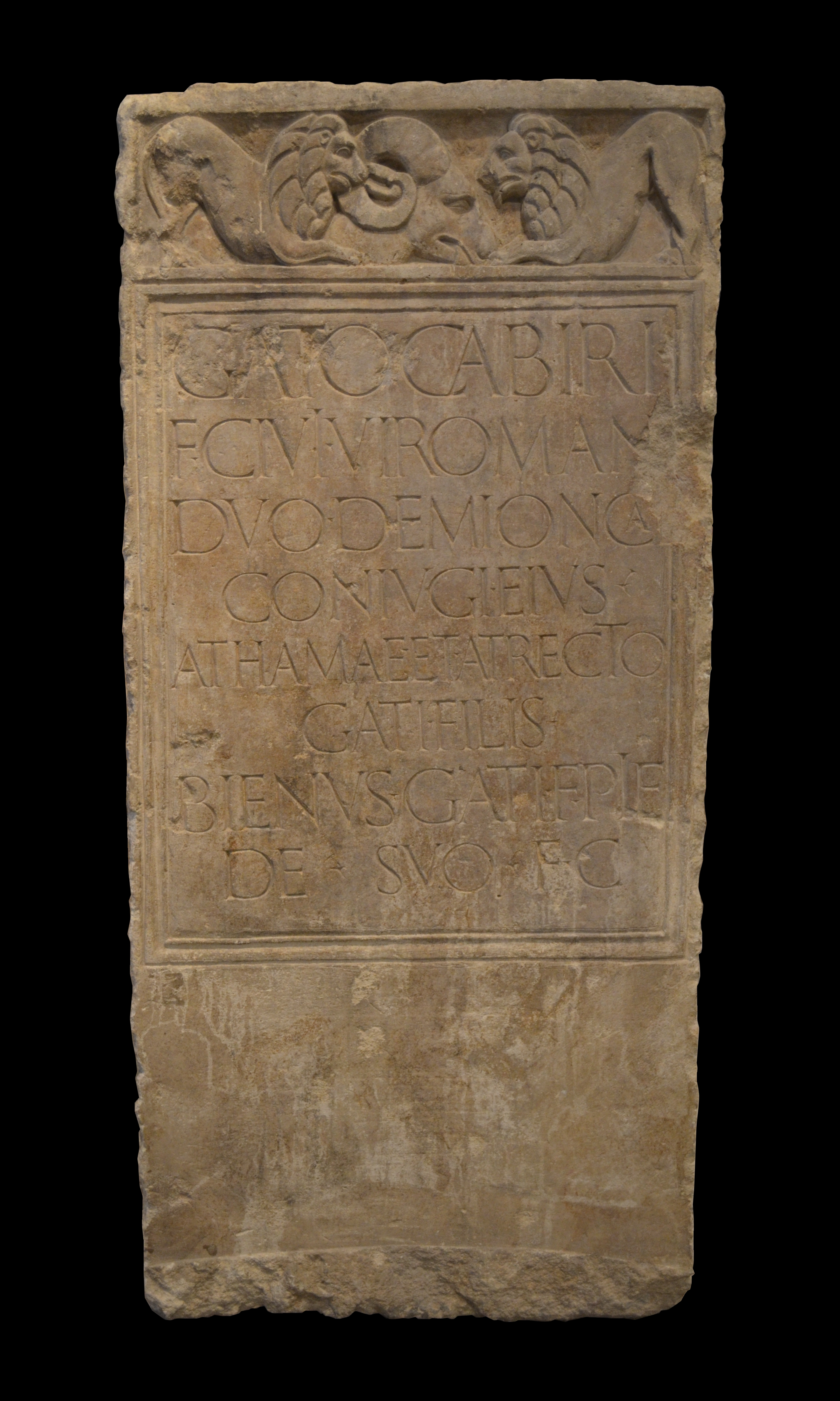 Musée romain-germanique (Cologne) (Römisch-Germanisches Museum (Köln)) - Stèle érigée par Bienus en l'honneur de son père, le Viromanduen Gatus, sa mère et ses deux frères.